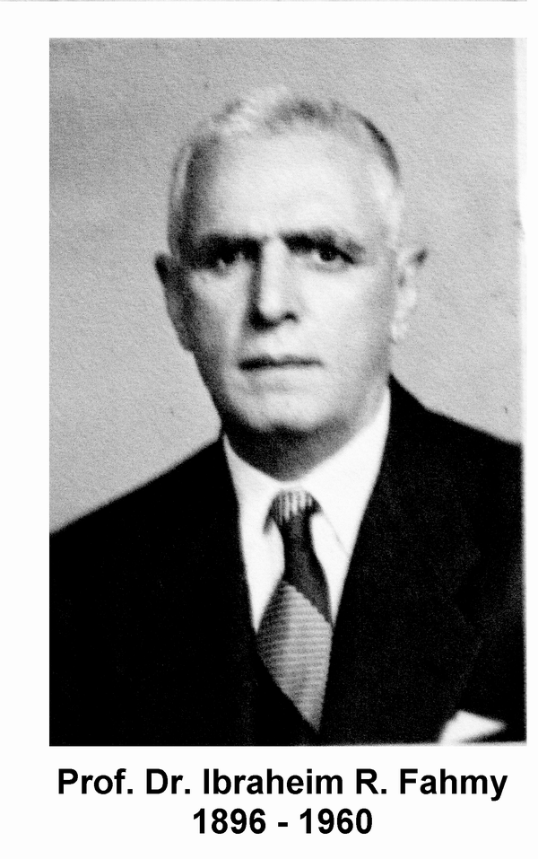 صورة شخصية للأستاذ الدكتور إبراهيم رجب فهمى